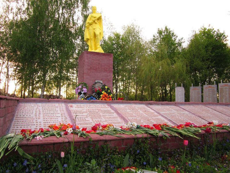 мемориал в самотоевке